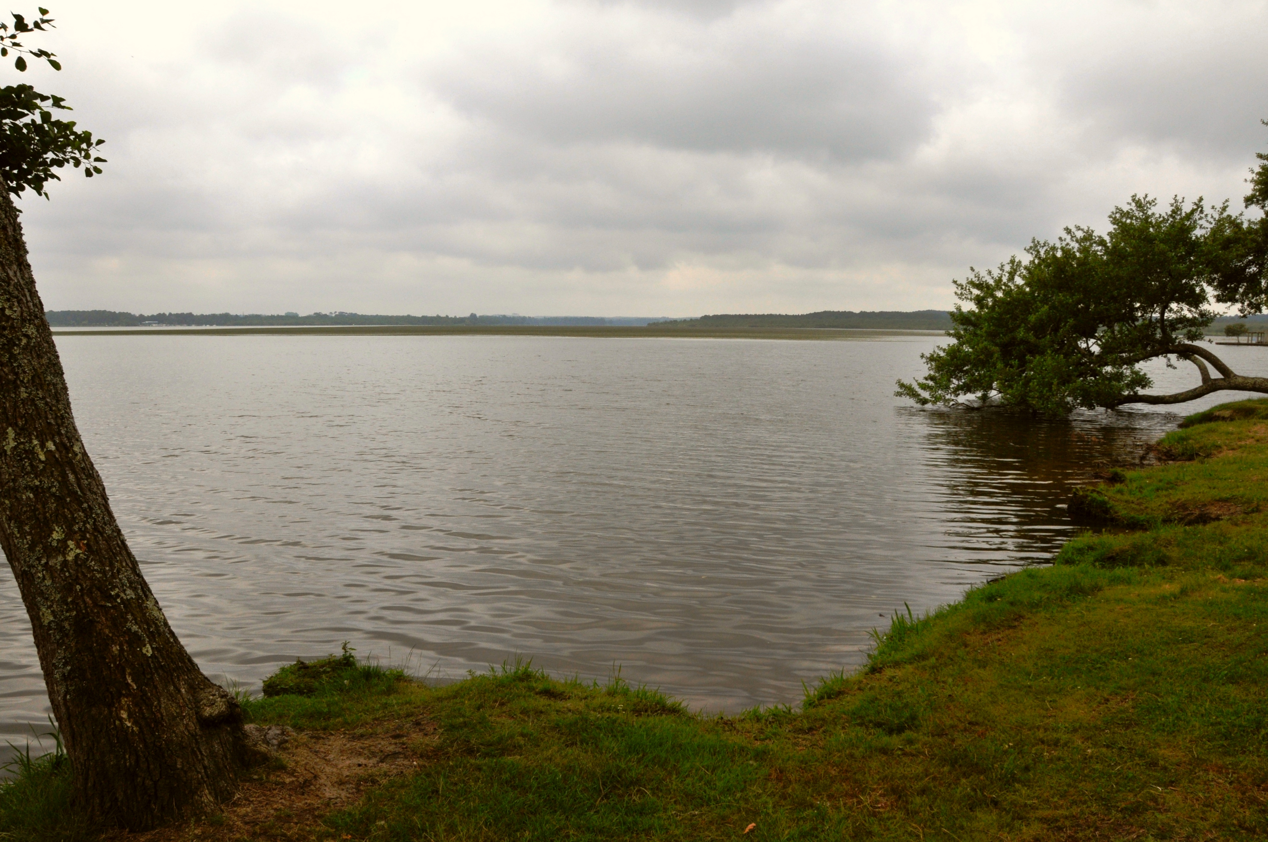 Lac de Soustons